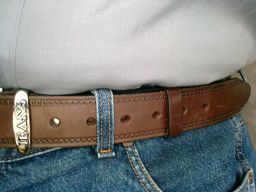 Skórzany pas zapięty na dżinsach; widoczne szlufki: metalowa i skórzana przy pasie oraz dżinsowe (druga widoczna tylko częściowo przy prawej krawędzi zdjęcia) - od spodni.